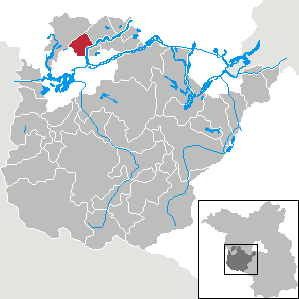 Beetzsee in Brandenburg (Country) - District Potsdam-Mittelmark